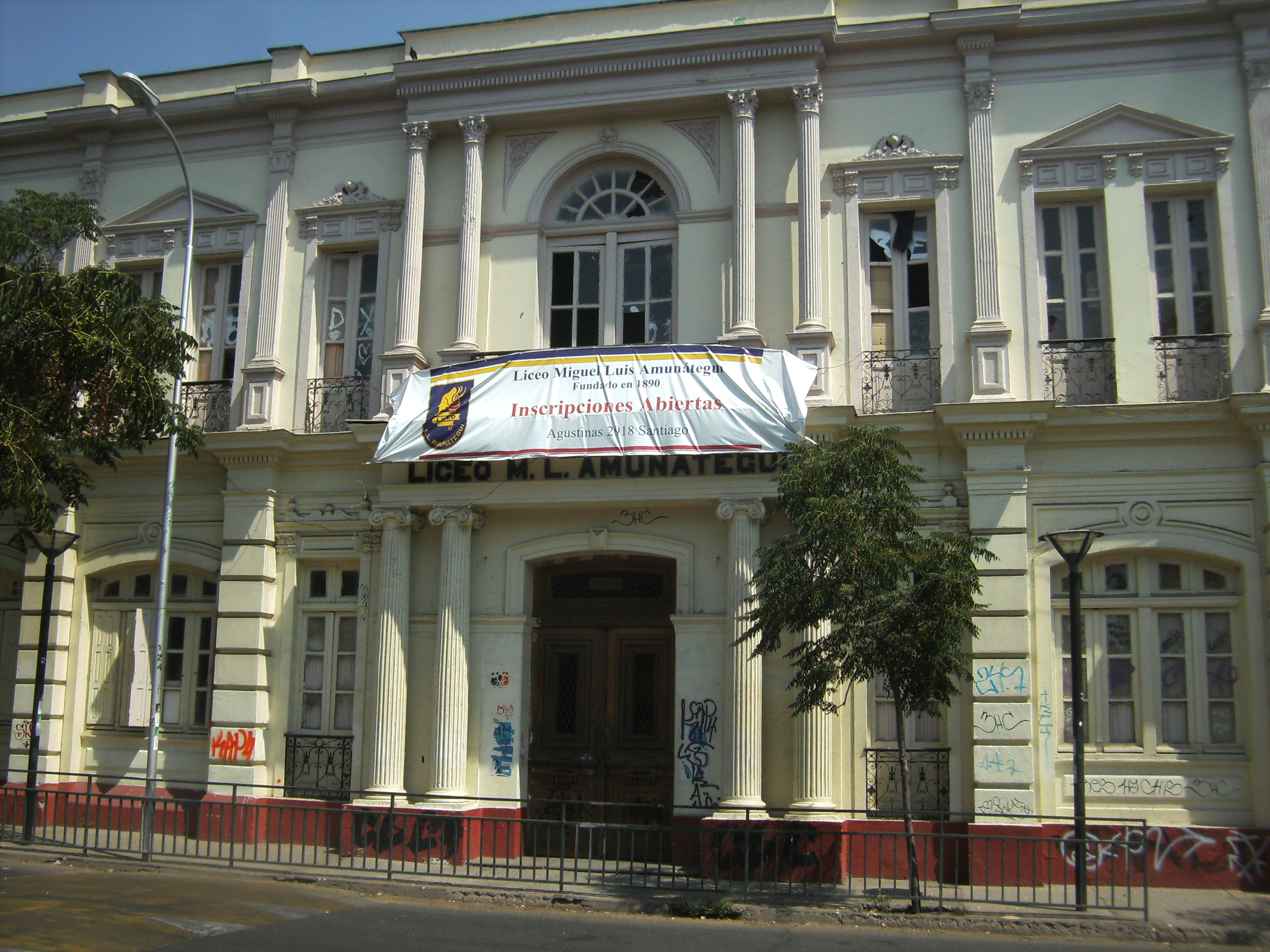 Visiones del liceo Amunátegui del Barrio Yungay en Santiago de Chile